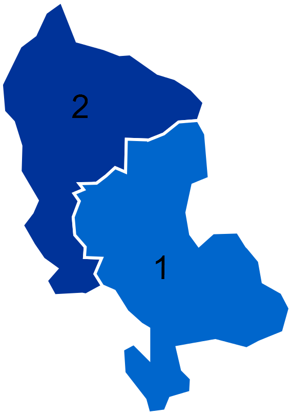 Résultats des élections législatives du Territoire de Belfort en 2012